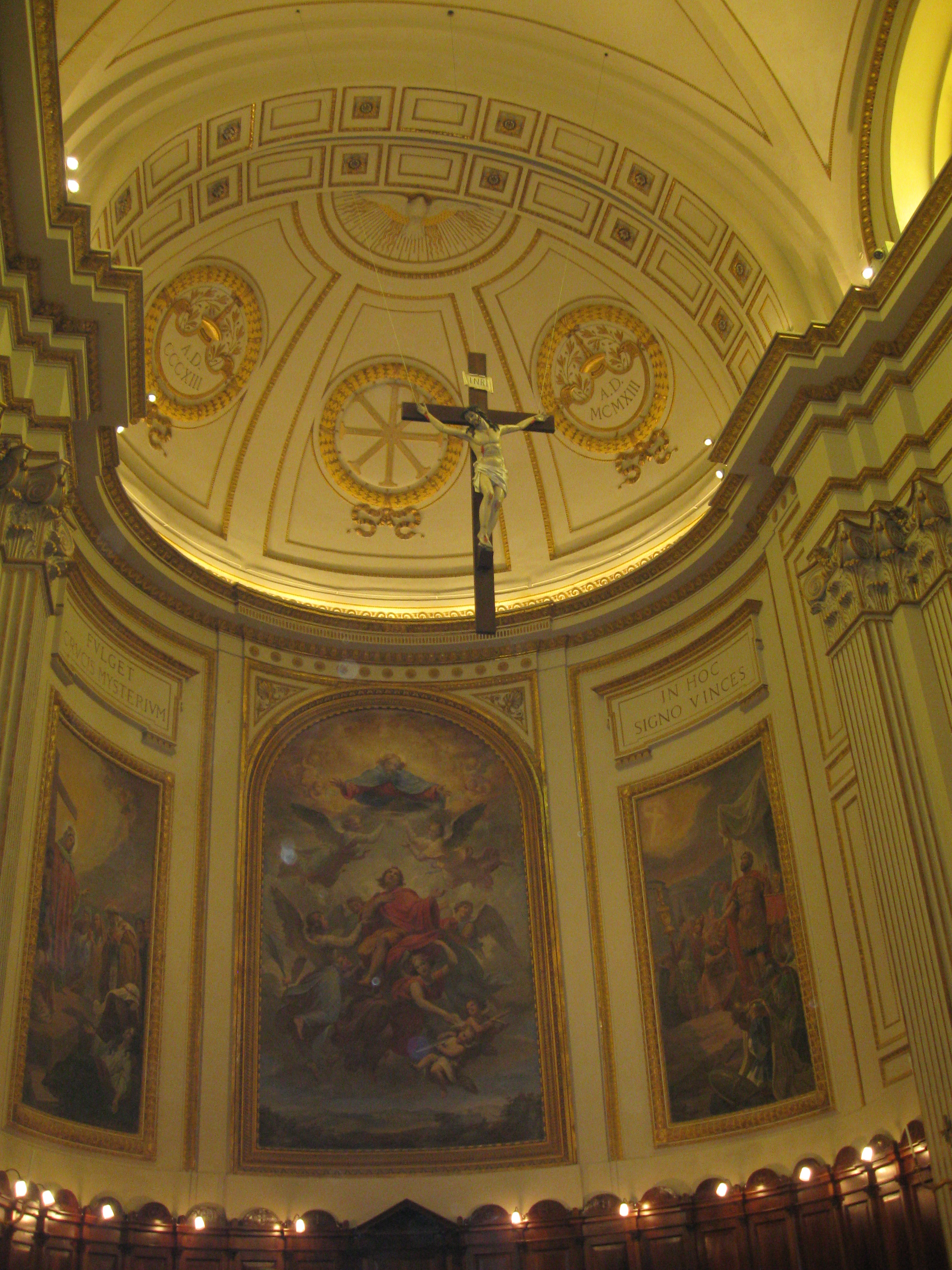 Abside della cattedrale di Albano (RM)